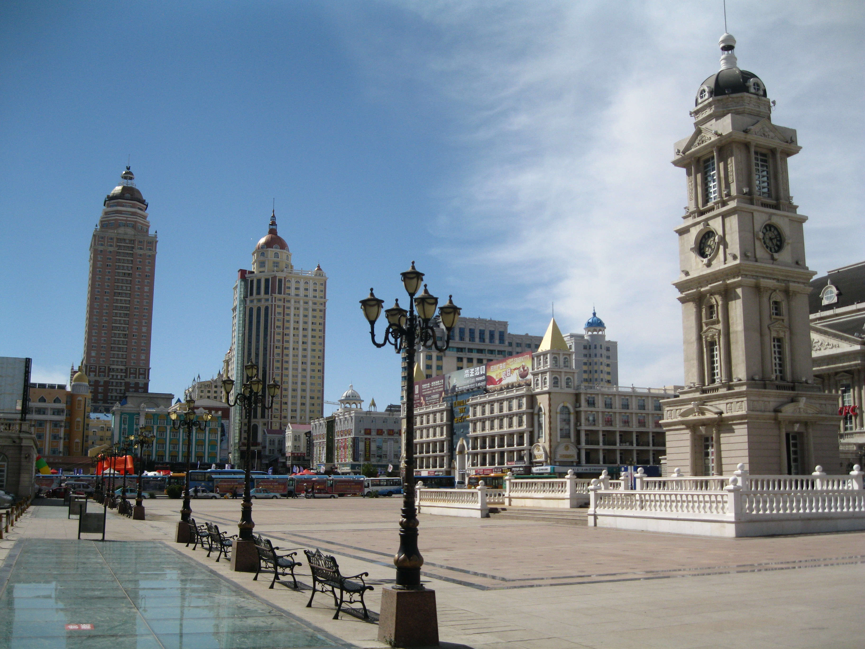 Площадь Век в Маньчжурии, Китай